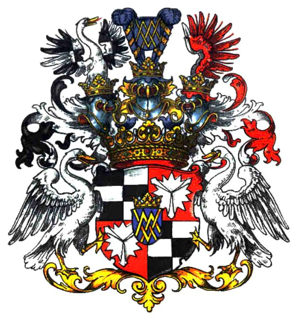 Wappen der Grafen von Merveldt